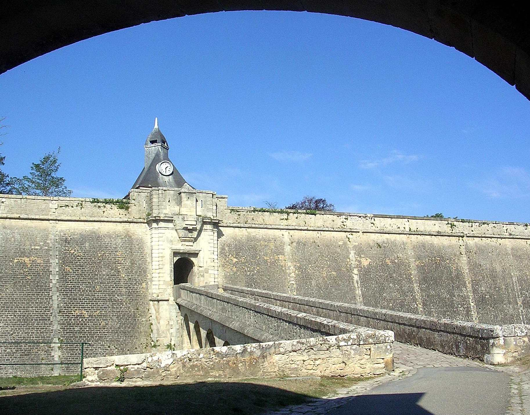 Citadelle de Blaye, la porte Dauphine